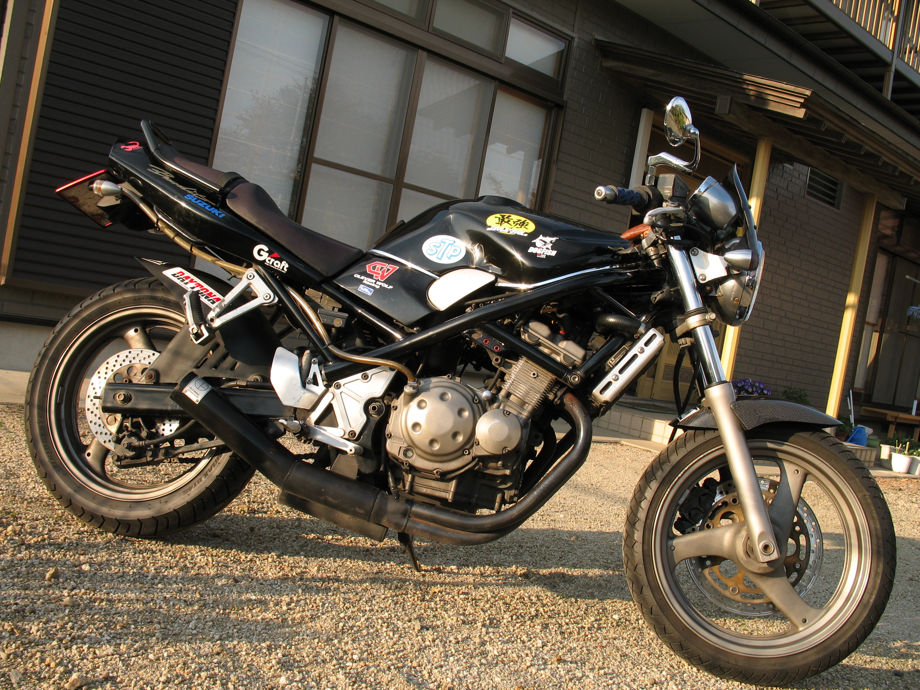 GSF 250